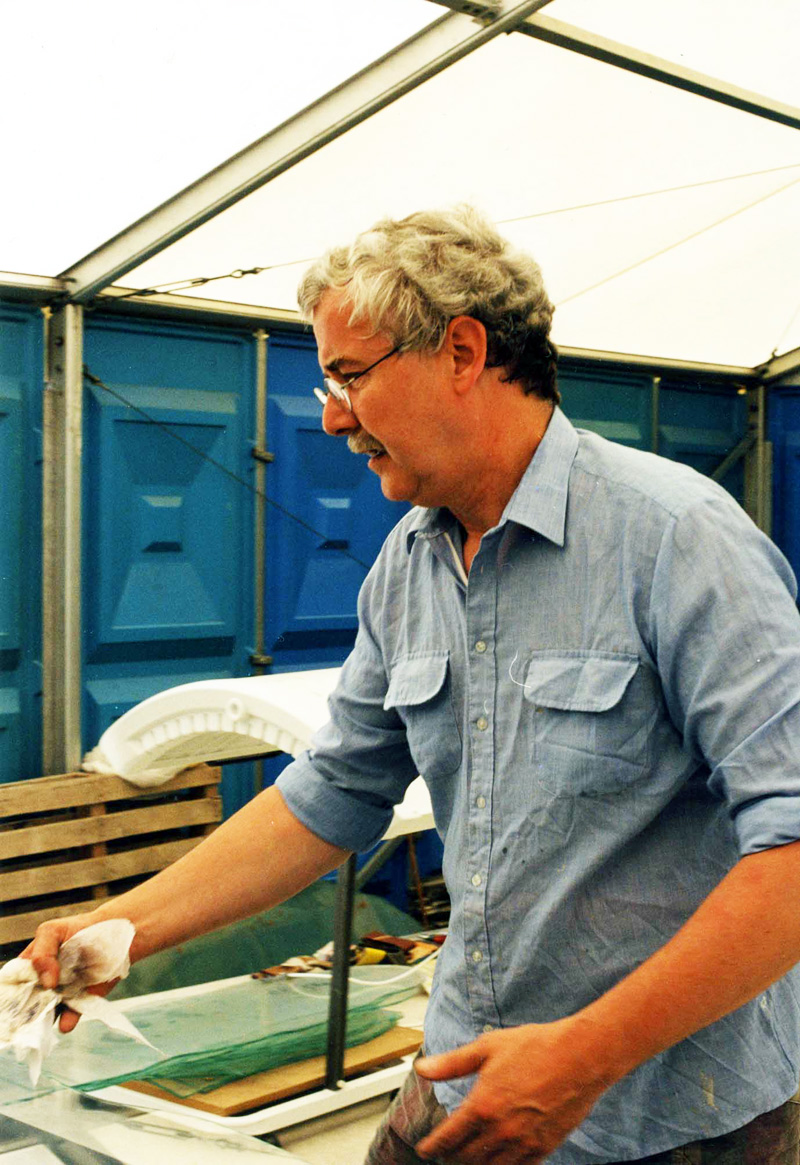 Bert van Loo - 1998 at work